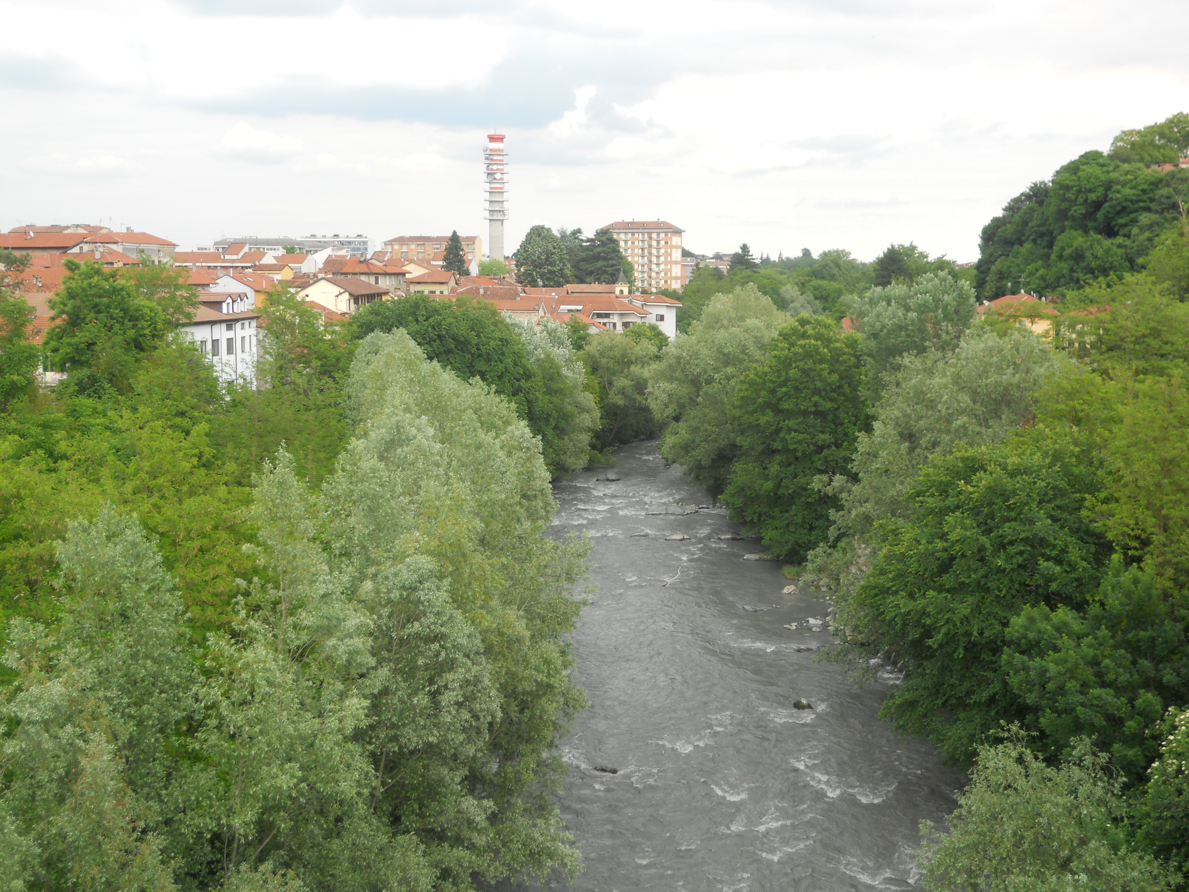 La Dora vista dal ponte Nuovo